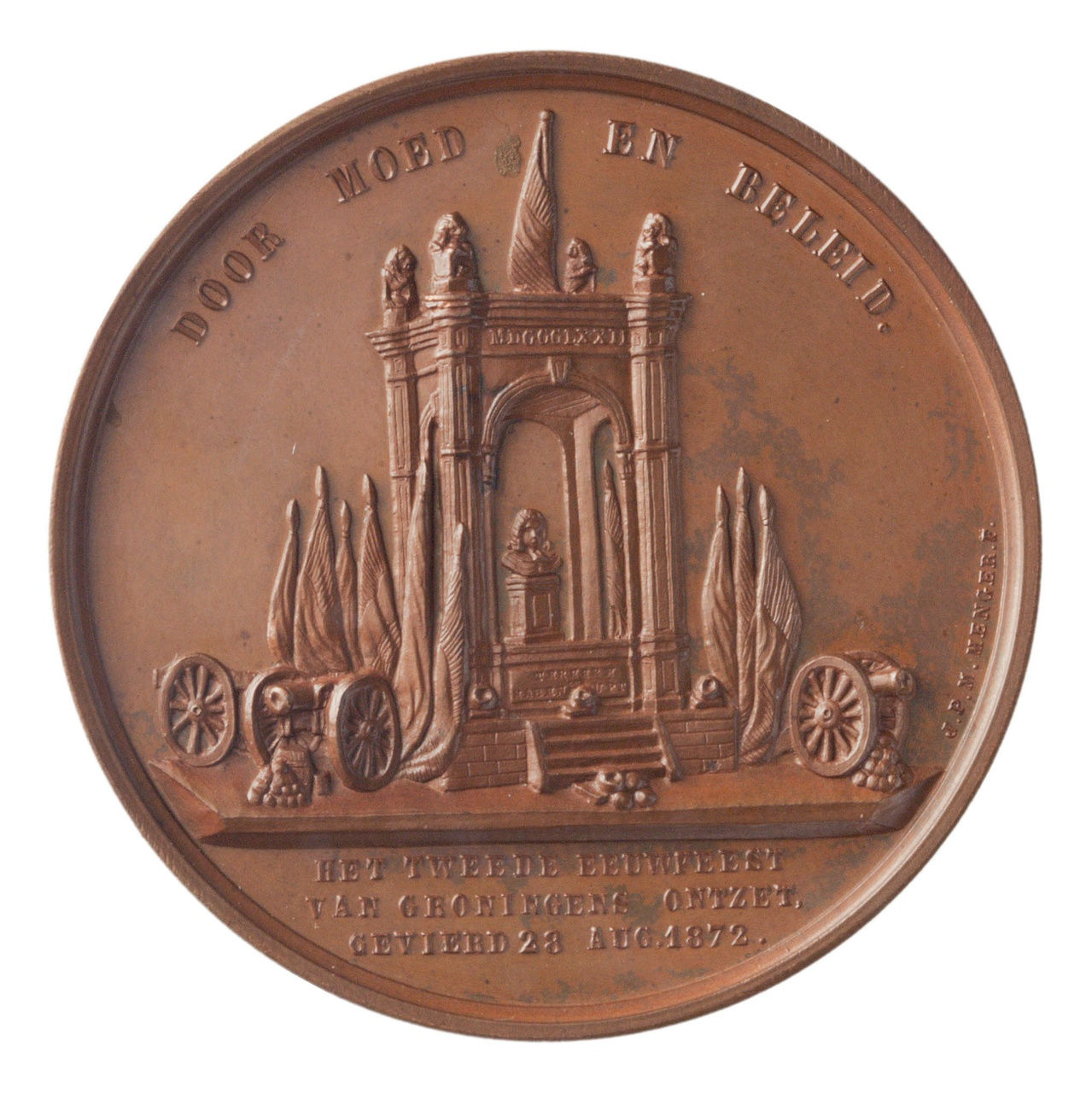 Gedenkpenning op het tweede eeuwfeest van het Gronings Ontzet (1862) Voorzijde: de staande Groningse Stedenmaagd, met in haar linkerhand een vaan met het stadswapen. Ze strekt de andere uit over een kussen met de sleutels van de stag, liggend op een voetstuk met aan de voorzijde het stadswapen. Achter de stedenmaagd ligt de Nederlandse leeuw. Omschrift: ONDER MIJNE HOEDE VEILIG. In de afsnede: GRONINGEN CONSTANT 1672. Signatuur: J.H. EGENBERGER INV. J.P. MENGER F. Keerzijde: Een monument met het borstbeeld van Rabenhaupt. Links en rechts vaandels en kanonnen. Signatuur: J.P.M. MENGER F Literatuur: L.W.A. Besier (1895) "De stempelsnijders van 's Rijks Munt te Utrecht in de laatste 50 jaren", Tijdschrift van het Nederlandsch Genootschap Munt- en Penningkunde, 2e jaargang, 1894. Amsterdam: G. Theod. Bom en zoon.